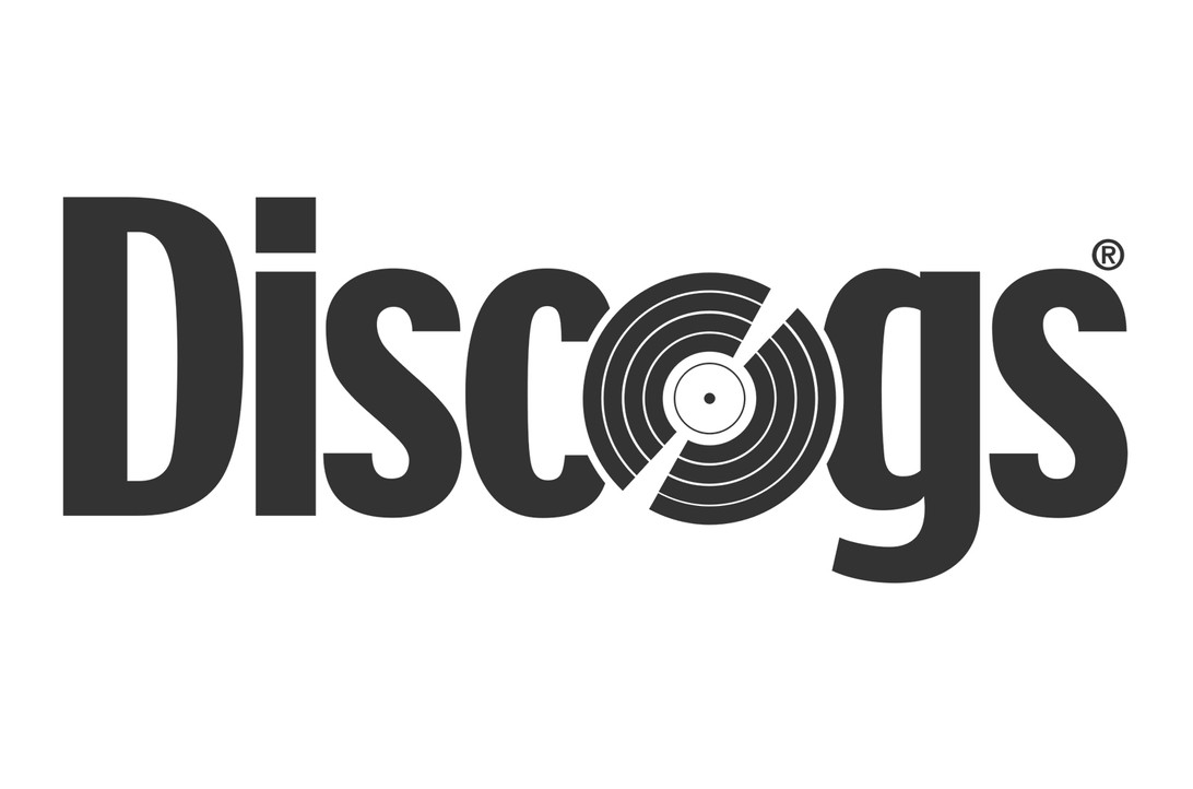 Imagen